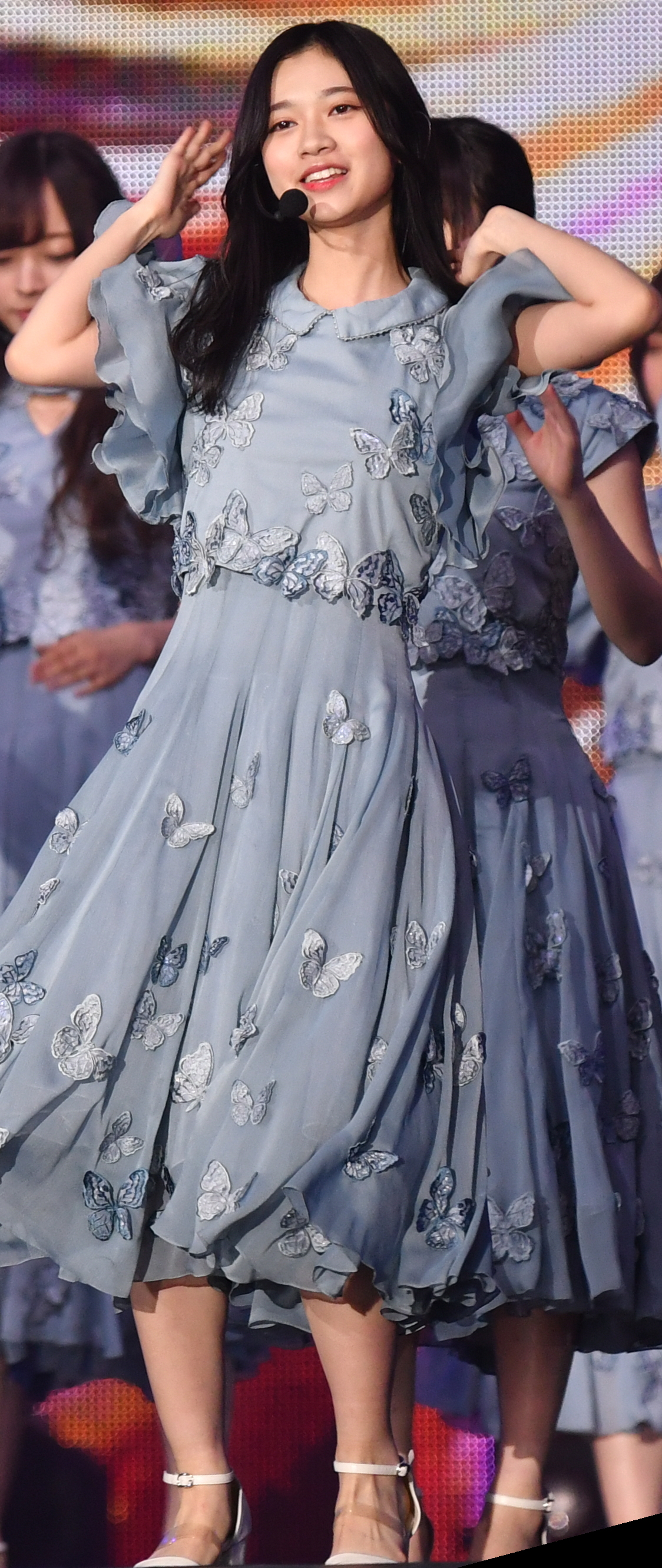 2019.01.26「第14回 KKBOX MUSIC AWARDS in Taiwan」乃木坂46 @台北小巨蛋